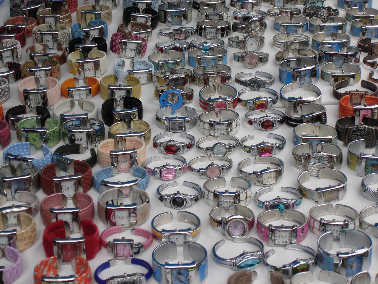 étalage montres marché de Vannes